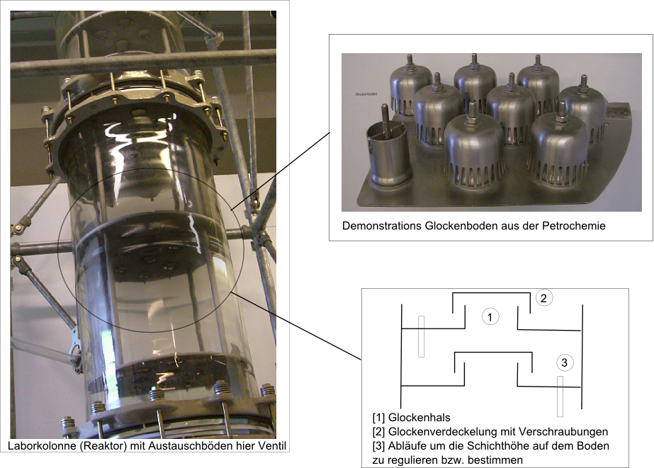 Schematische und photographische Darstellung eines Glockenbodens einer Rektifikationsanlage aus der Petrochemie (SVG ist vorhanden)